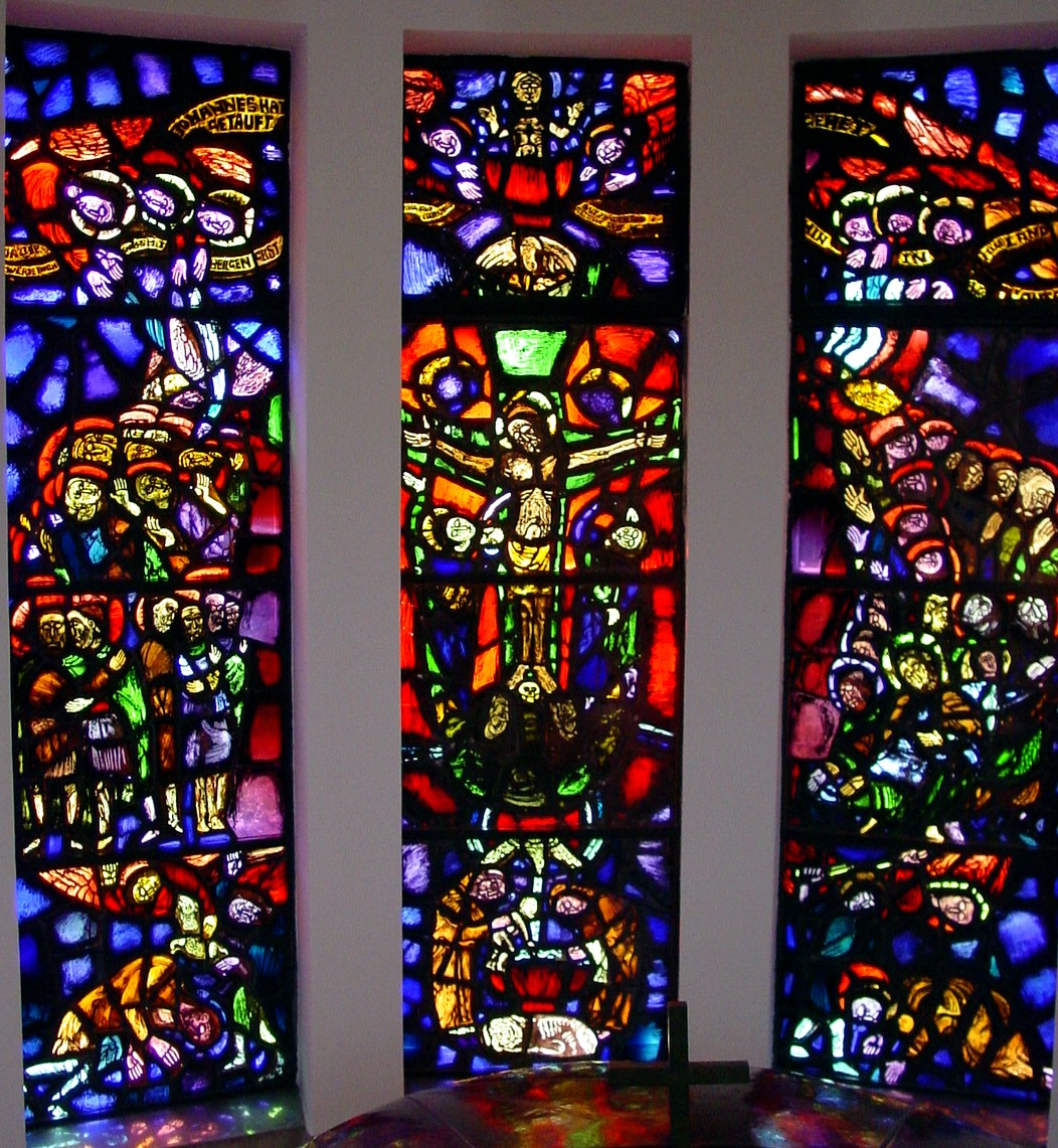 Pfarrkirche Liesing (Wien 23) - Taufkapelle, gestaltet von Magret Bilger. Für die drei Mittelstreifen, die eine Einheit bilden, erhielt die Künstlerin 1954 bei der Internationalen Ausstellung christlicher Kunst in Wien eine Goldene Medaille.